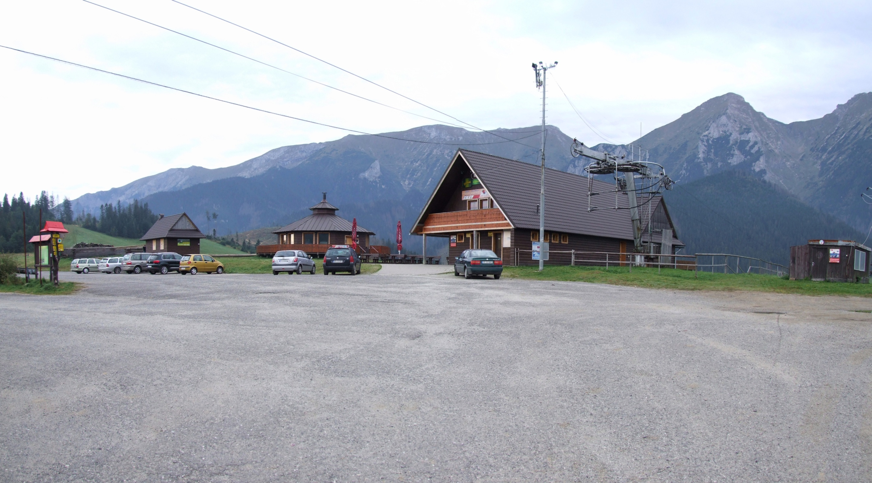 Ośrodek turystyczno-narciarski na przełęczy Średnica i widok na Tatry Bielskie